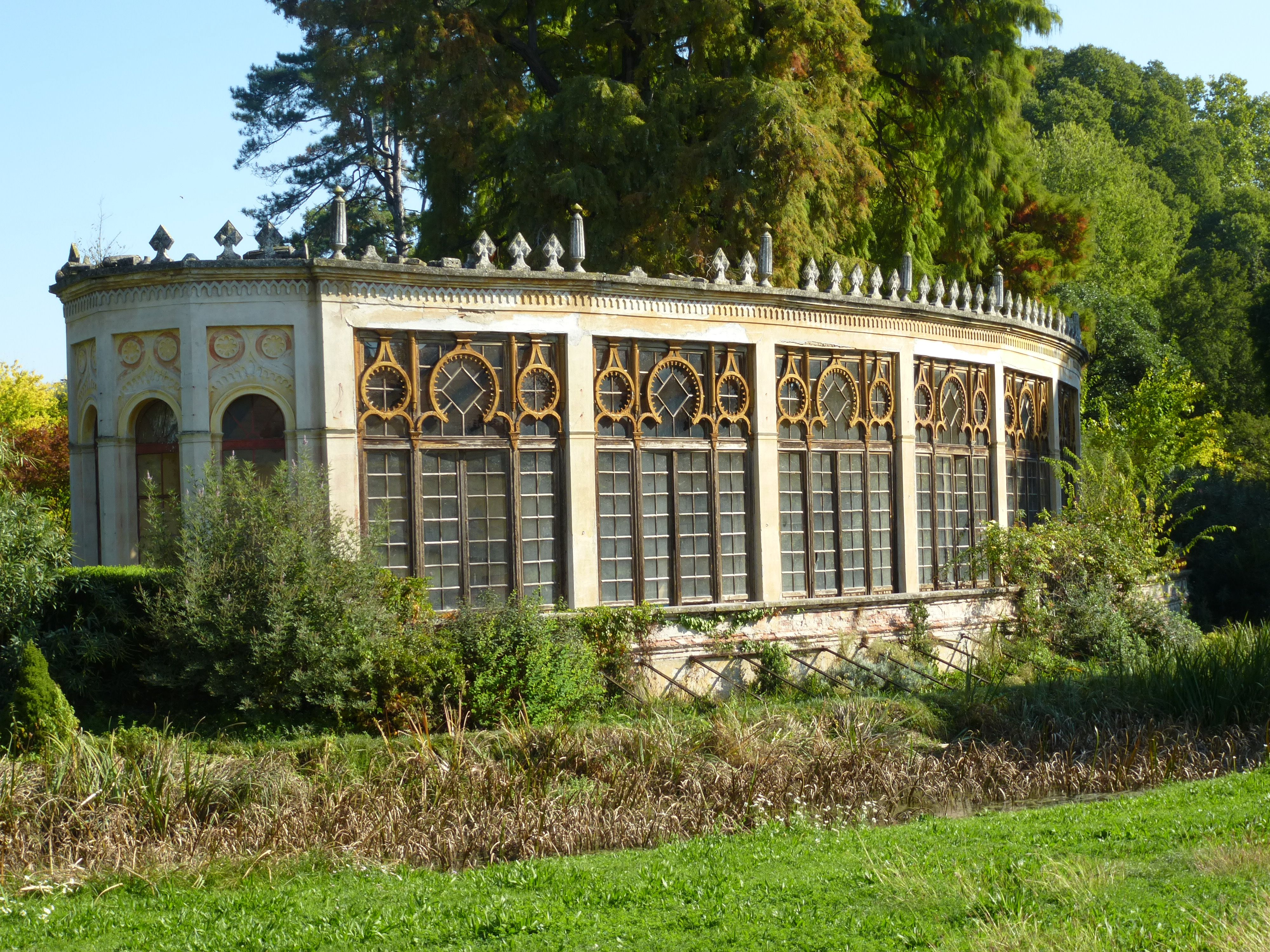 Gewächshaus im Revedin-Bolasco-Park (Castelfranco Veneto)